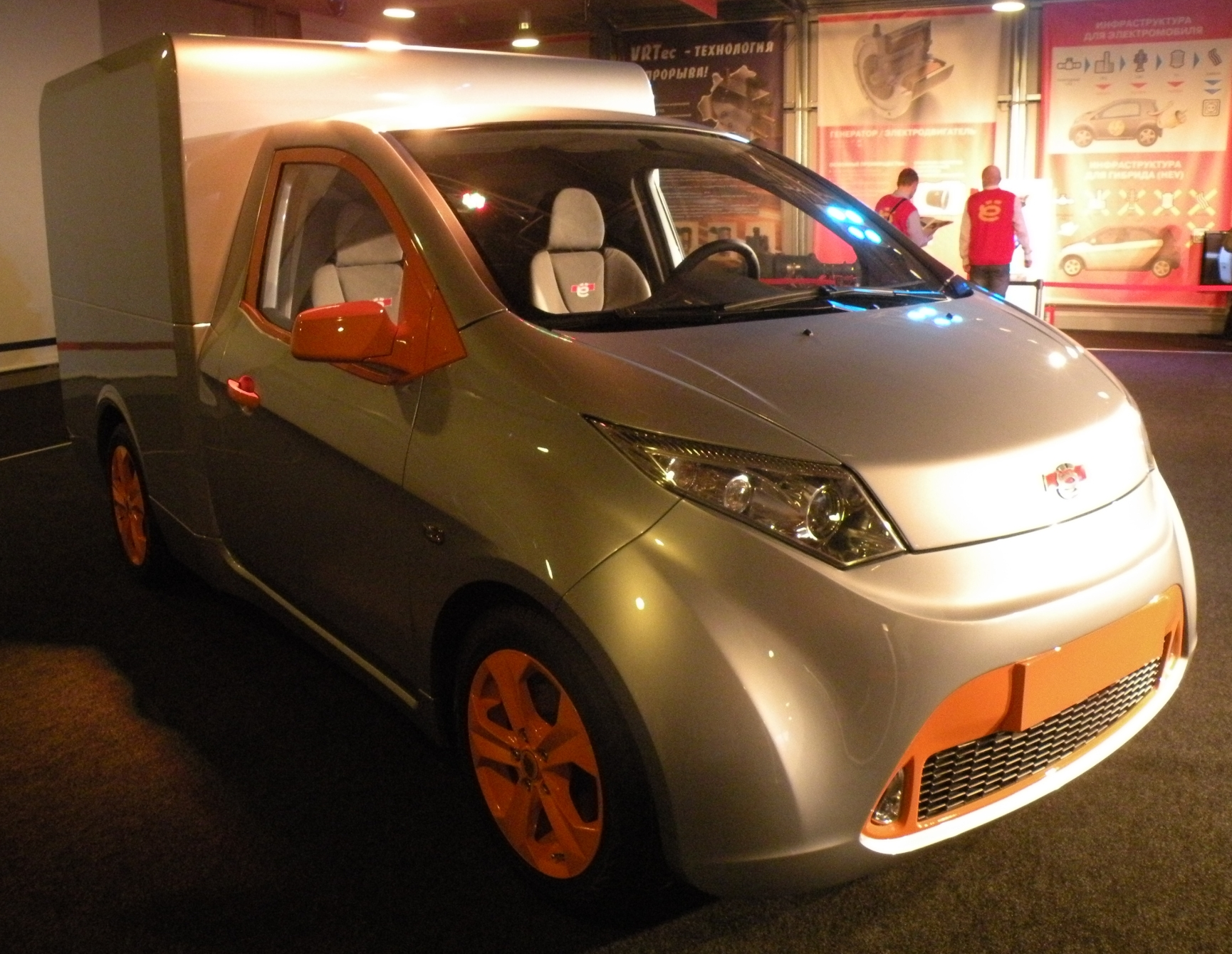 Ё-фургон